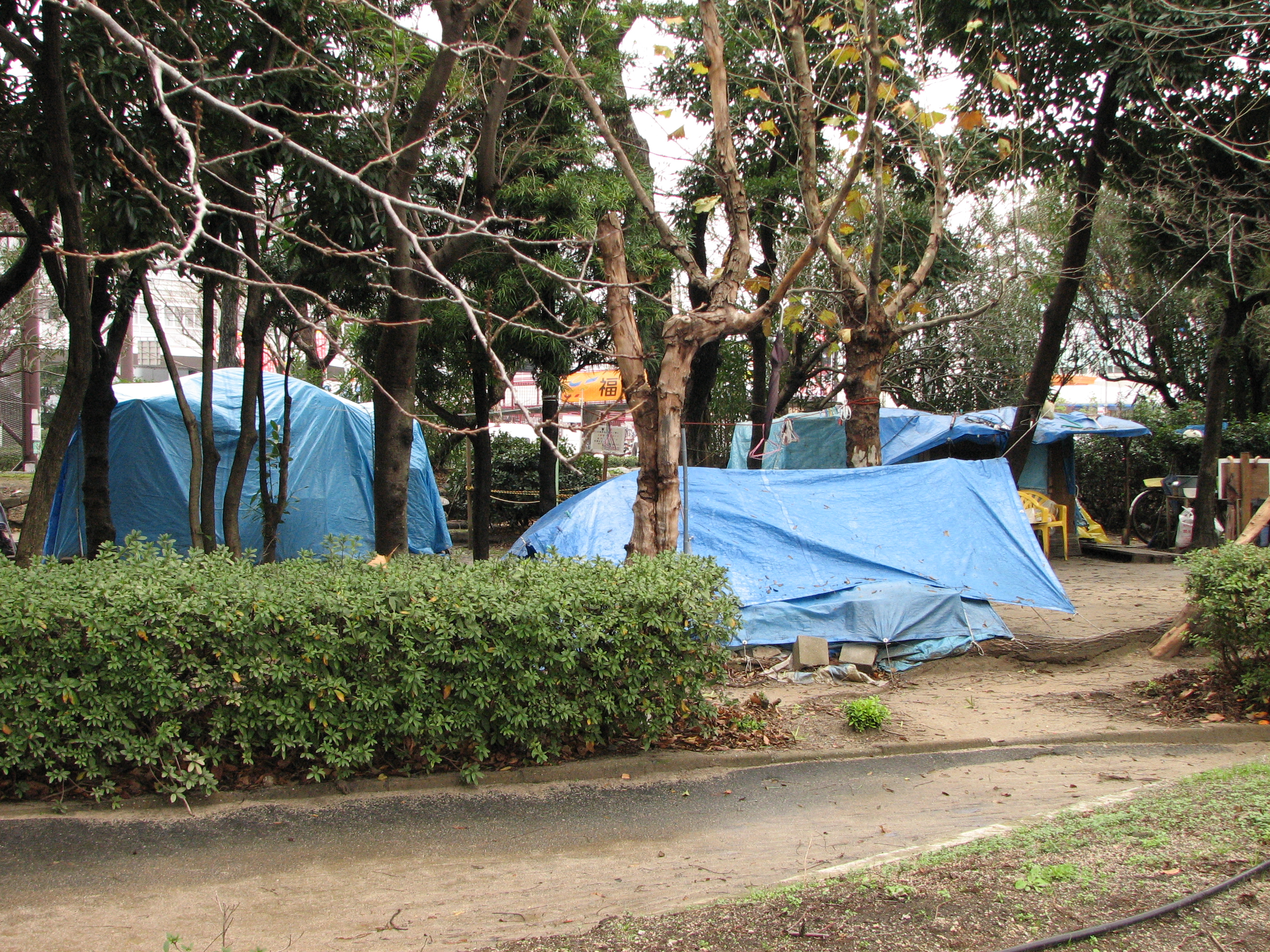 Homeless in Fukuoka, Japan.